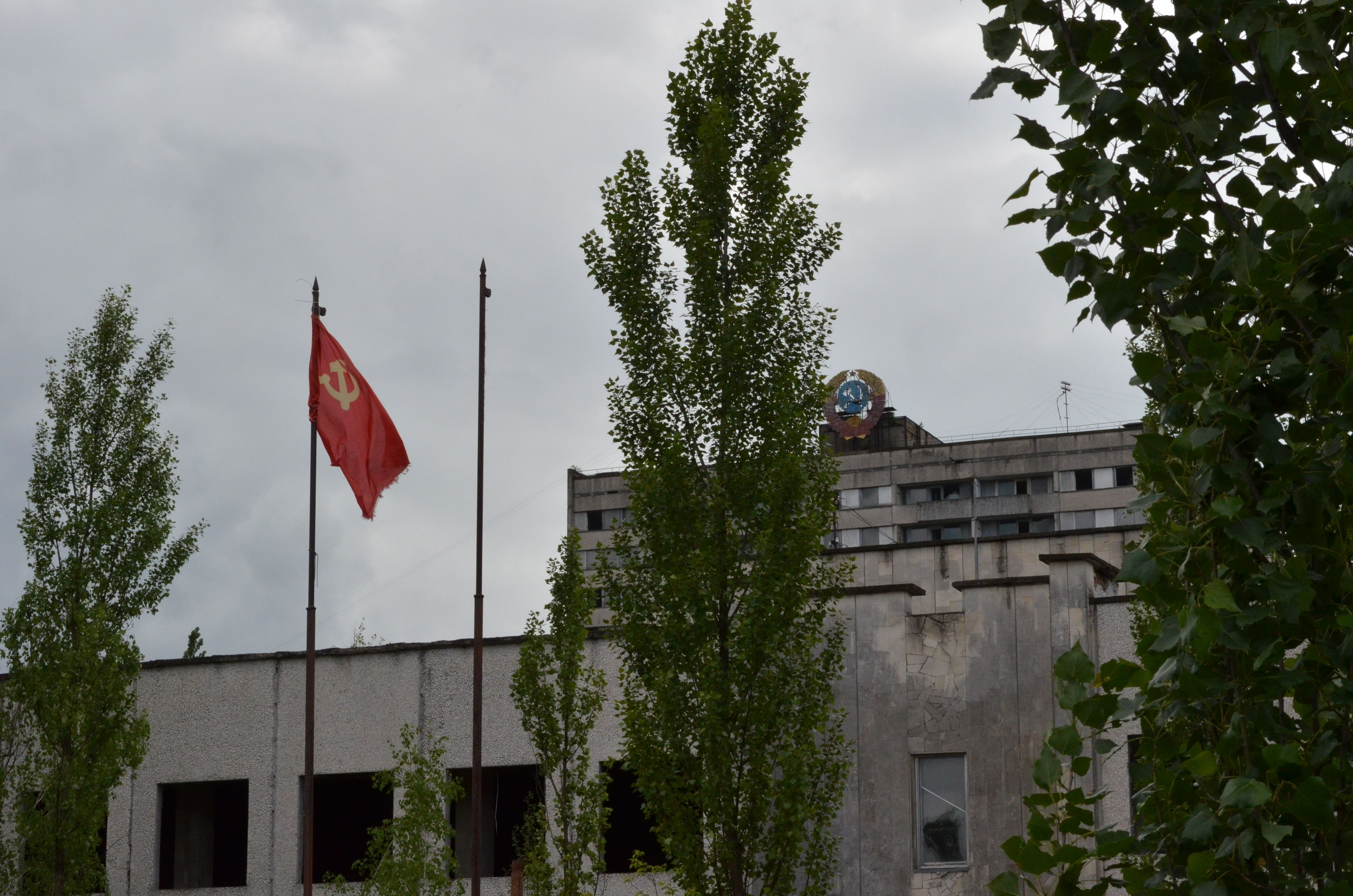 Вікіекспедиція до Чорнобиля 2013